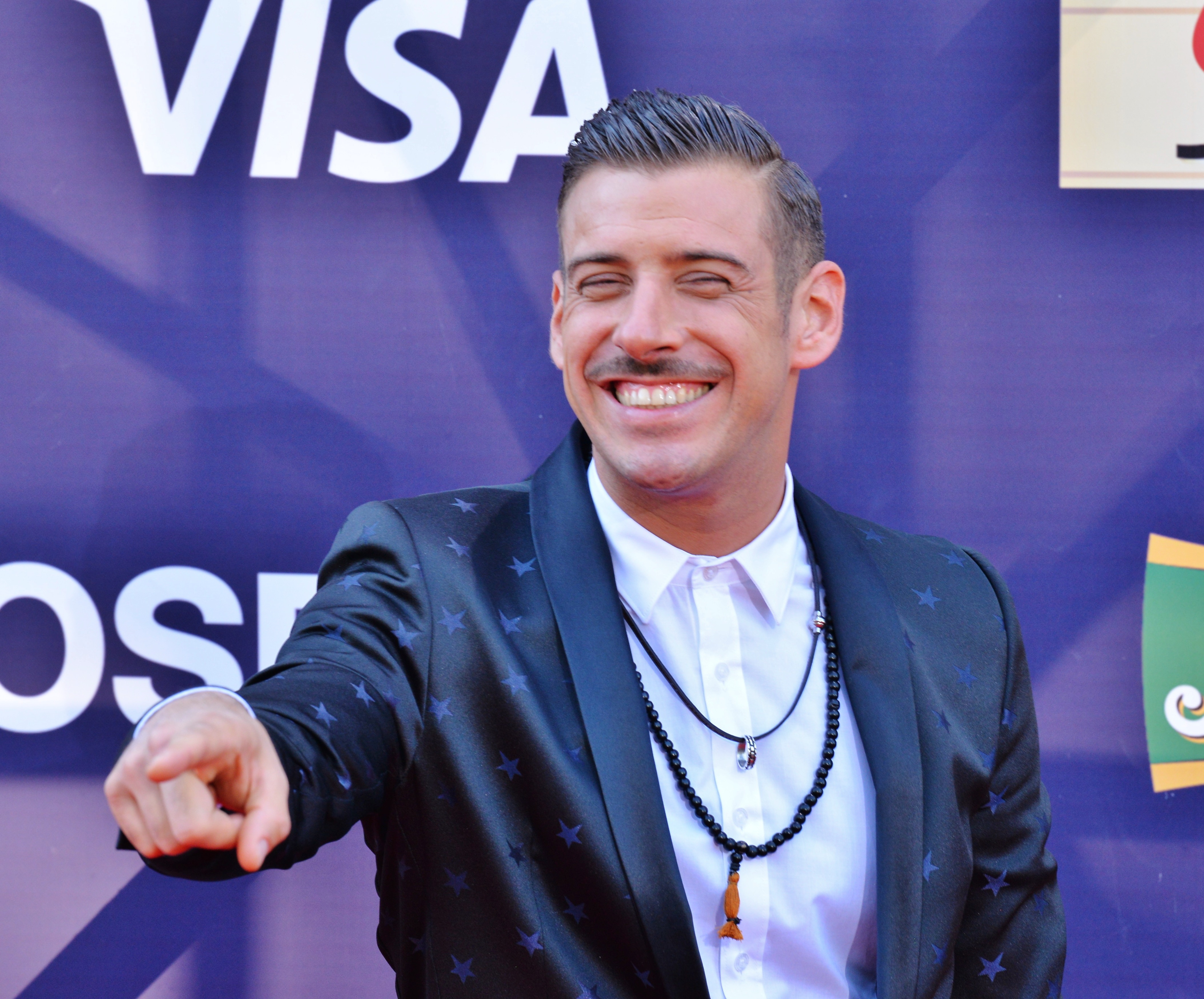 Франческо Габбані на церемонії відкриття Євробачення 2017 у Києві